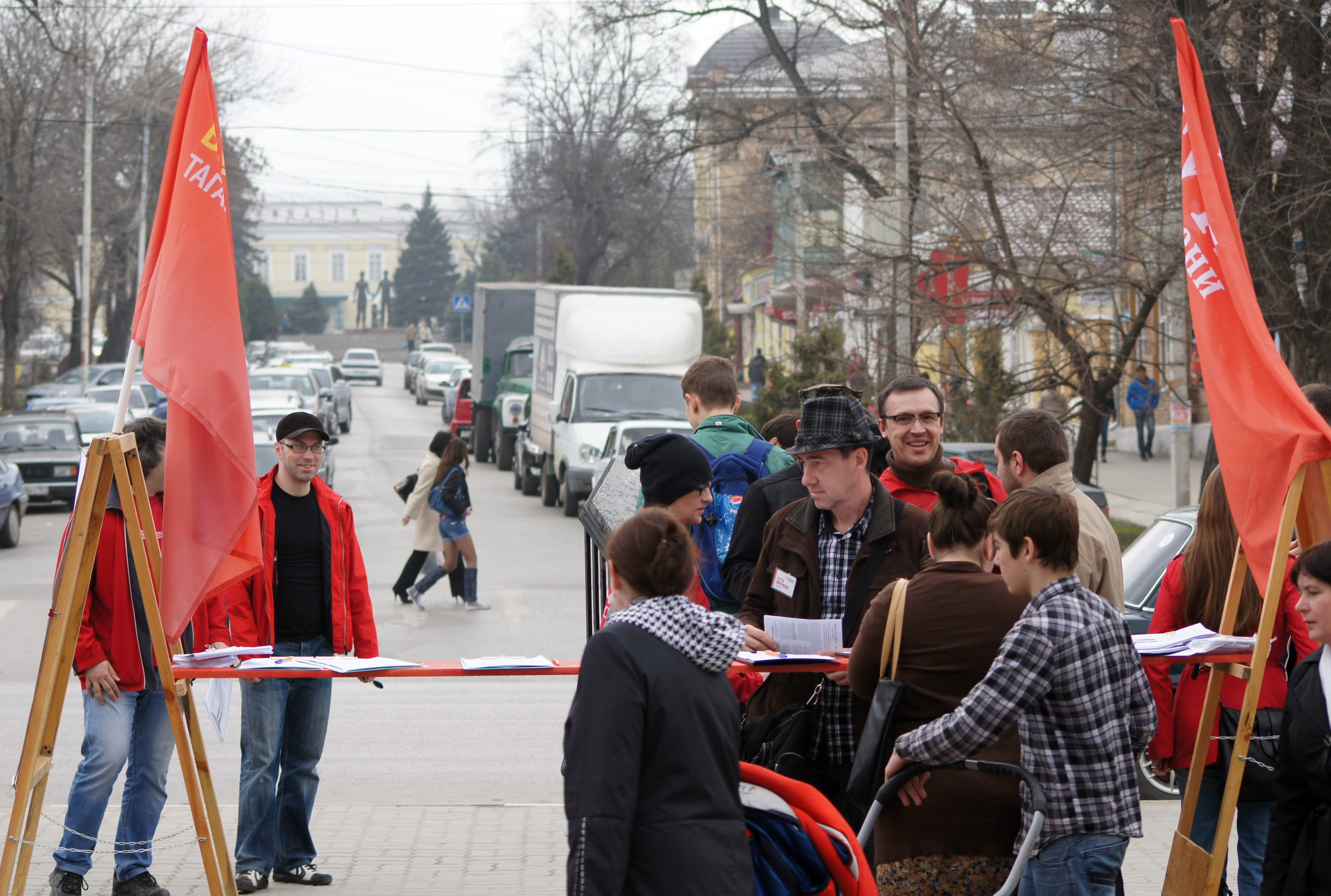 Пикет и сбор подписей против переноса Памятника таганрогским подпольщикам «Клятва юности». Таганрог, 7 апреля 2013 г.